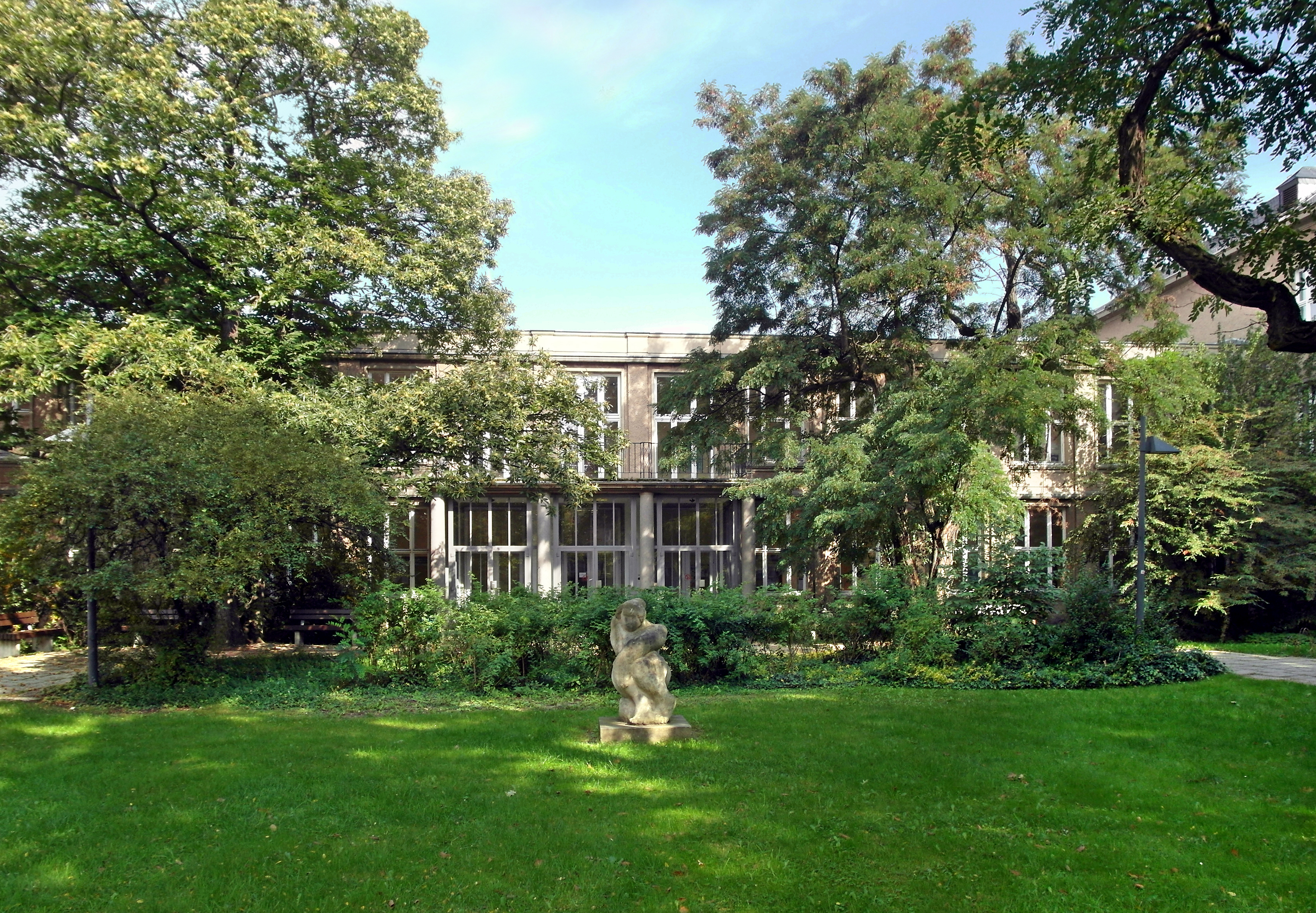 23.09.2017 01067 Dresden-Räcknitz, Zellescher Weg: Willersbau der TU Dresden, Hof zwischen den Flügeln B und C mit Steinplastik (GMP: 51.028828,13.733539). [SAM2066.JPG]20170923235DR.JPG(c)Blobelt